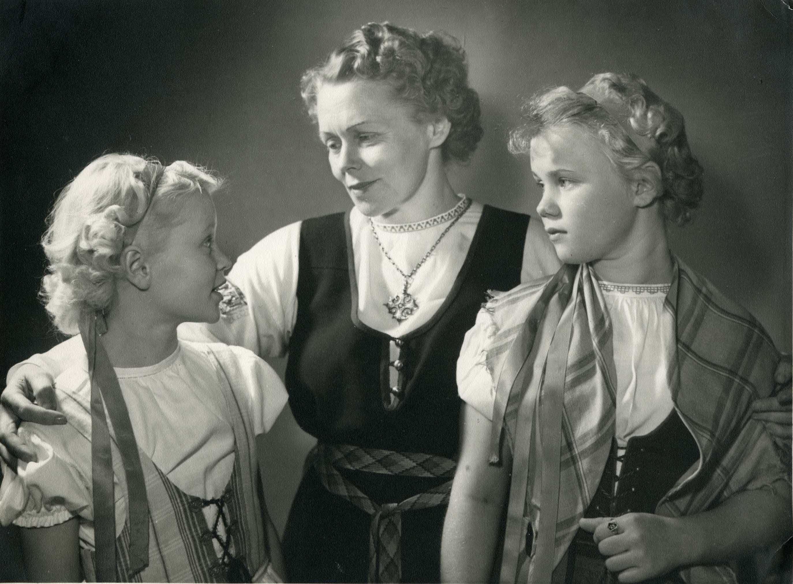 Kastehelmi Karjalainen tyttärineen Konservatorion lausuntaillassa "Lapsi iloissaan ja suruissaan" vuonna 1953